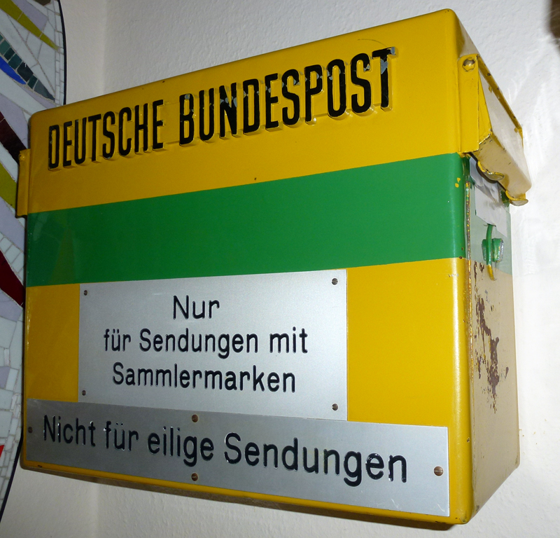 Postbriefkasten der Deutschen Bundespost, hier mit grünem Streifen welcher darauf aufmerksam macht, dass dieser Kasten "Nur für Sendungen mit Sammlermarken – Nicht für eilige Sendungen" gedacht ist. Exponat im Rheinhessischen Postmuseum